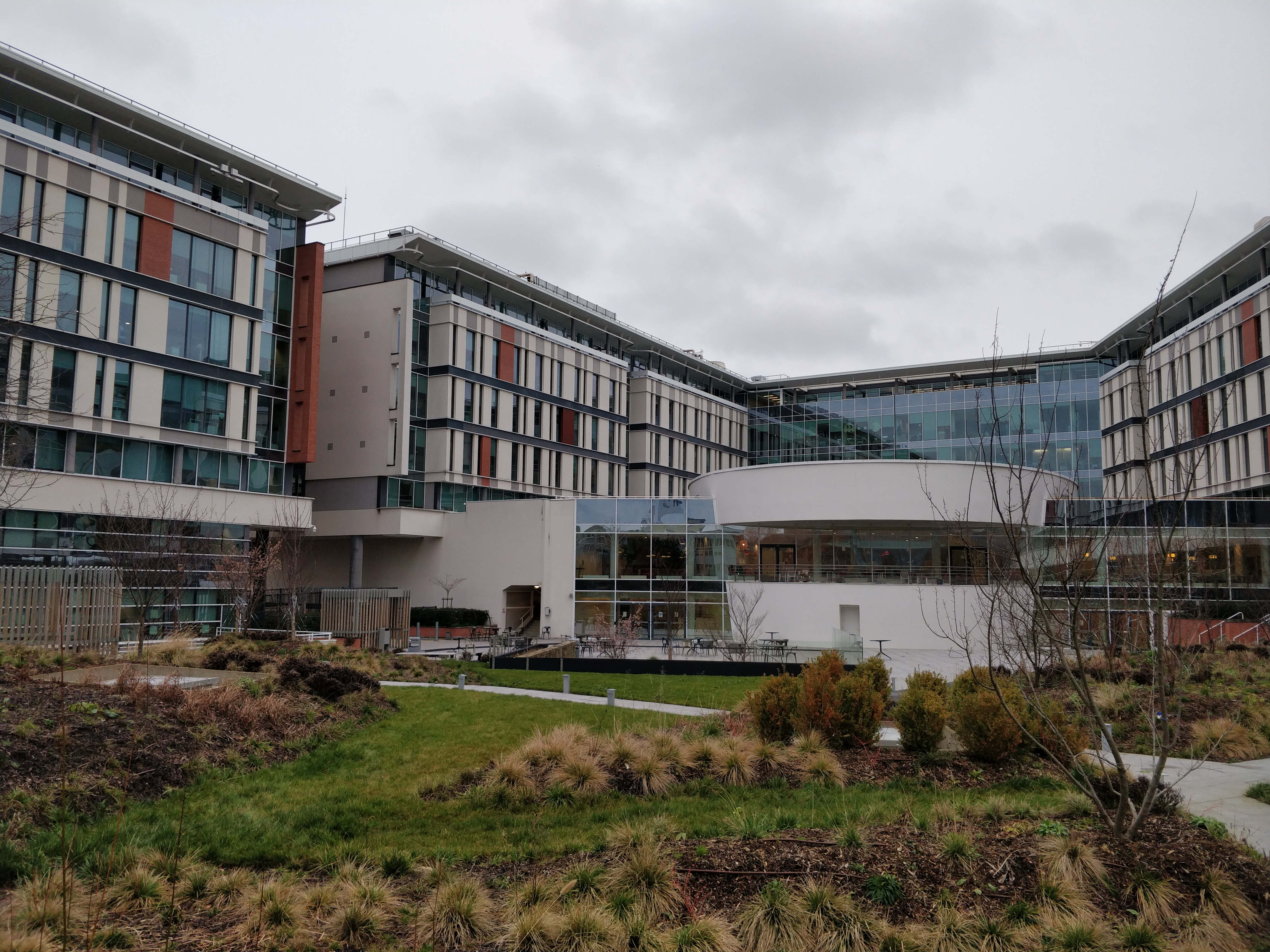 Immeuble Gaia (Massy) depuis les jardins intérieurs